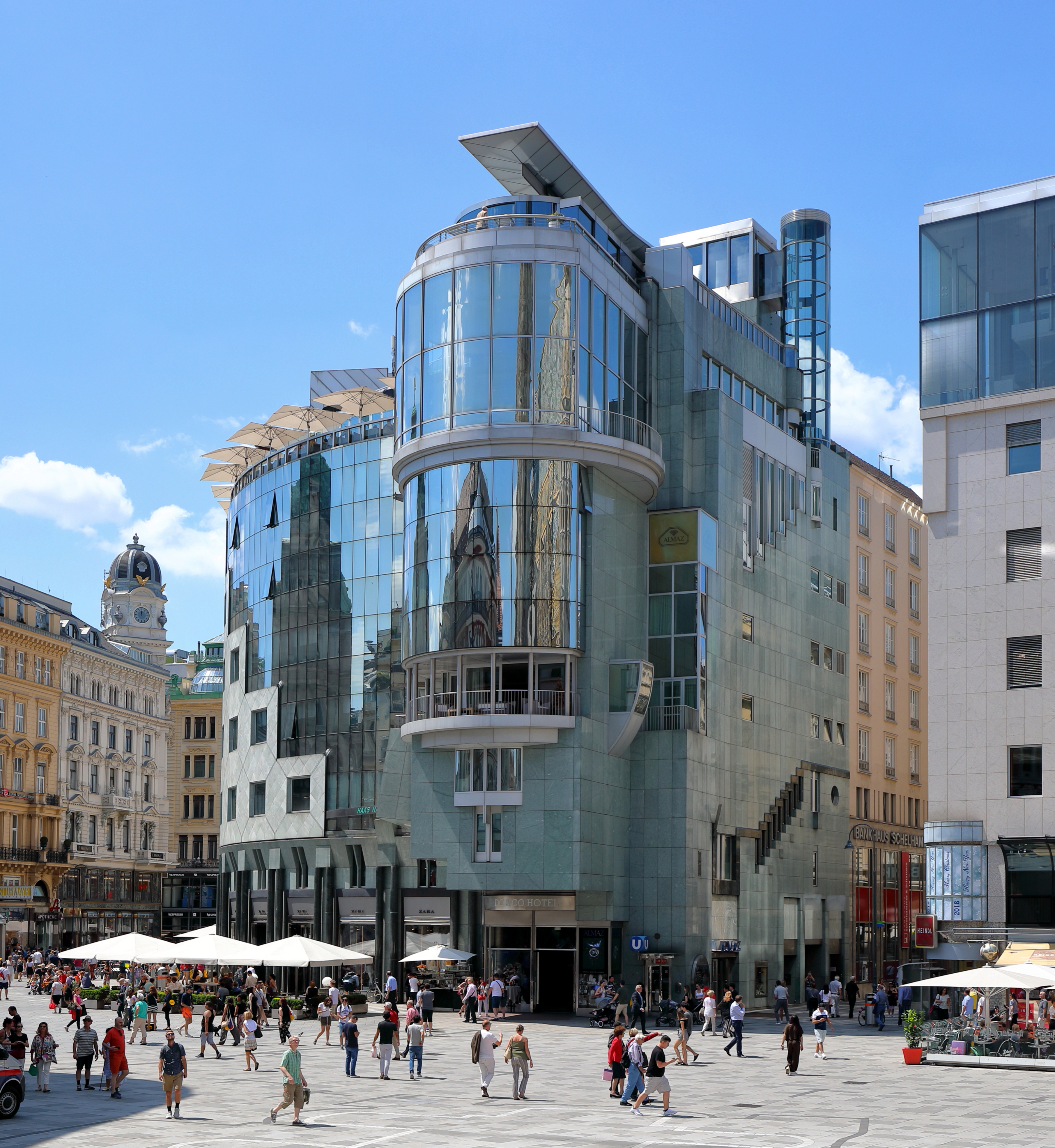 Das Haas-Haus an der Adresse Stock-im-Eisen-Platz 4 (Goldschmiedgasse 1 / Graben 32 / Stephansplatz 12) im 1. Wiener Gemeindebezirk Innere Stadt.Das 1. Haas-Haus wurde von 1865 bis 1867 errichtet, im II. WK zerstört und dann abgetragen. Das 2. Haas-Haus wurde von 1951 bis 1953 nach Plänen von Max Fellerer und Carl Appel errichtet und trotz Protesten 1986 abgetragen. Das 3. Haas-Haus (Hollein-Haus) und jetzige ließen die damaligen Eigentümer (Zentralsparkasse und Kommerzialbank AG sowie Wiener Städtische Wechselseitige Versicherung) trotz heftigen Protesten und Bürgerinitiativen nach Plänen des Architekten Hans Hollein errichten. Die Grundsteinlegung fand im Herbst 1987, die Gleichenfeier am 2. September 1988 und die Eröffnung am 15. September 1990 statt.